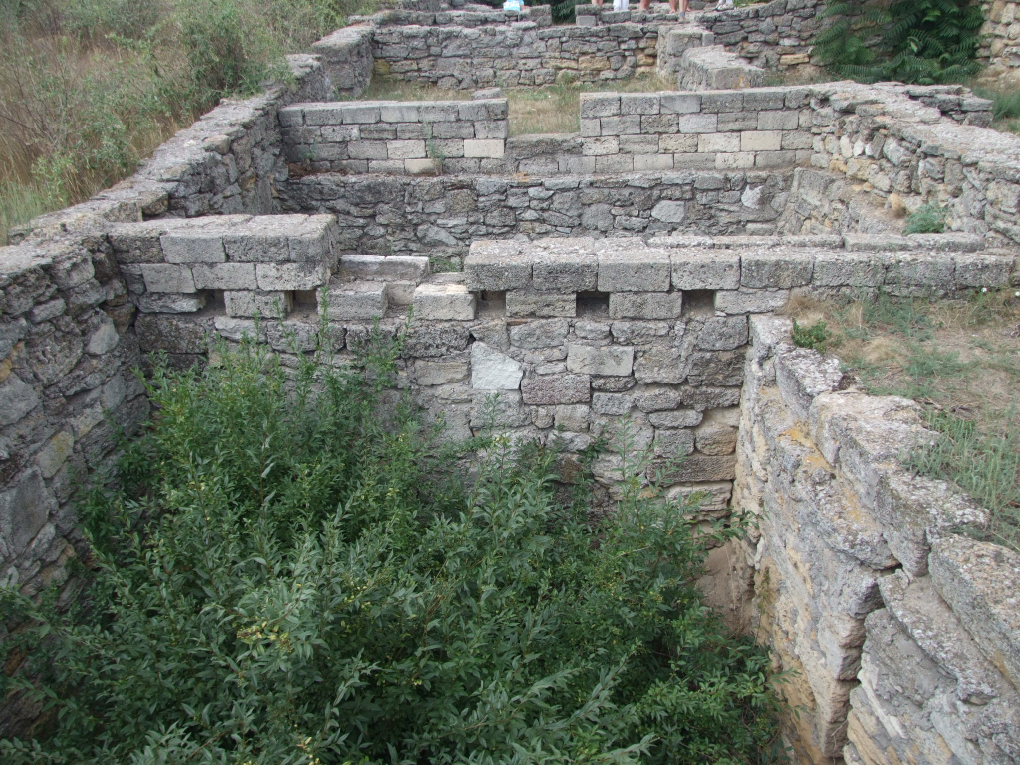 Стародавнє місто Ольвія